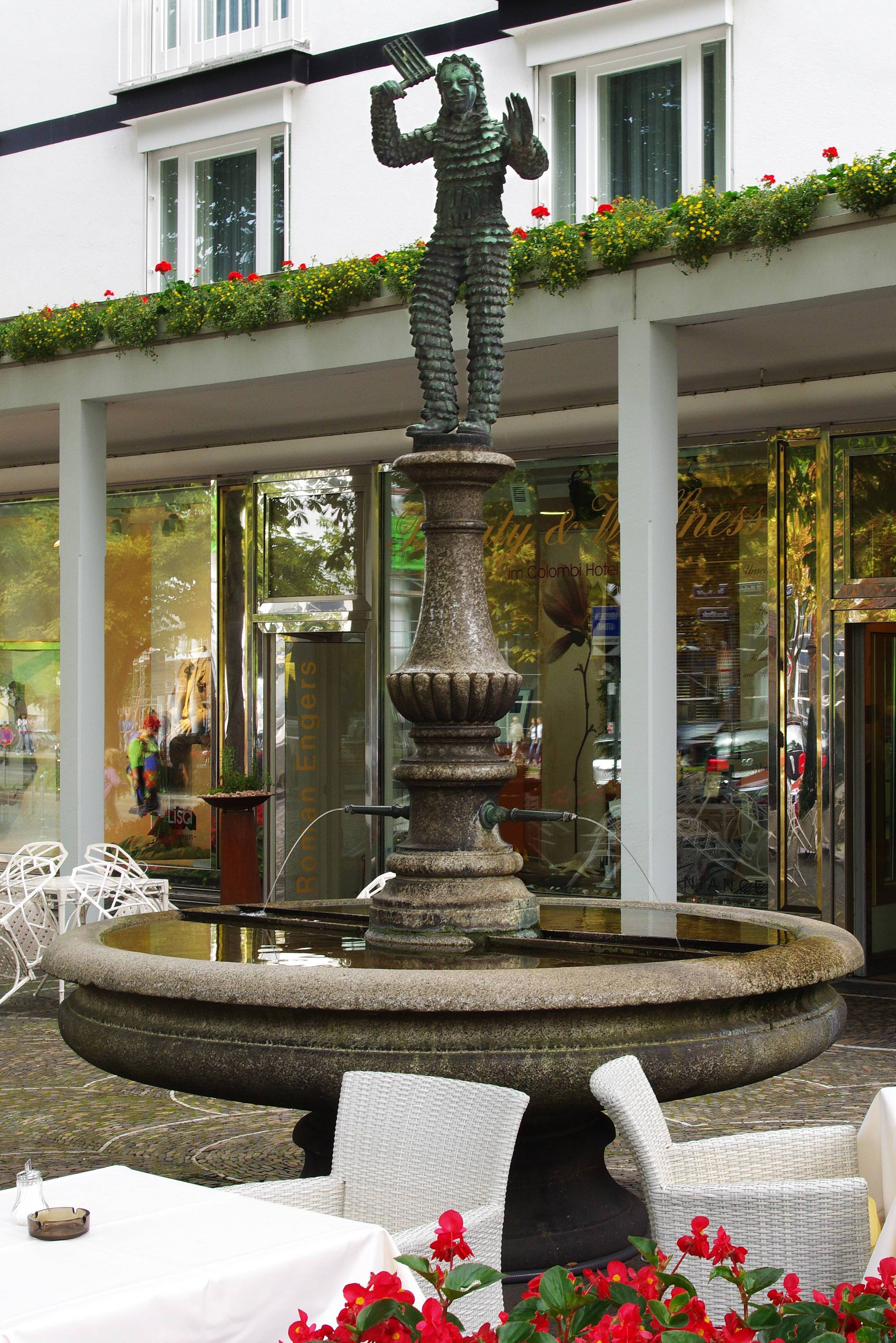 Der Fastnetsruferbrunnen vor dem Colombi-Hotel in Freiburg